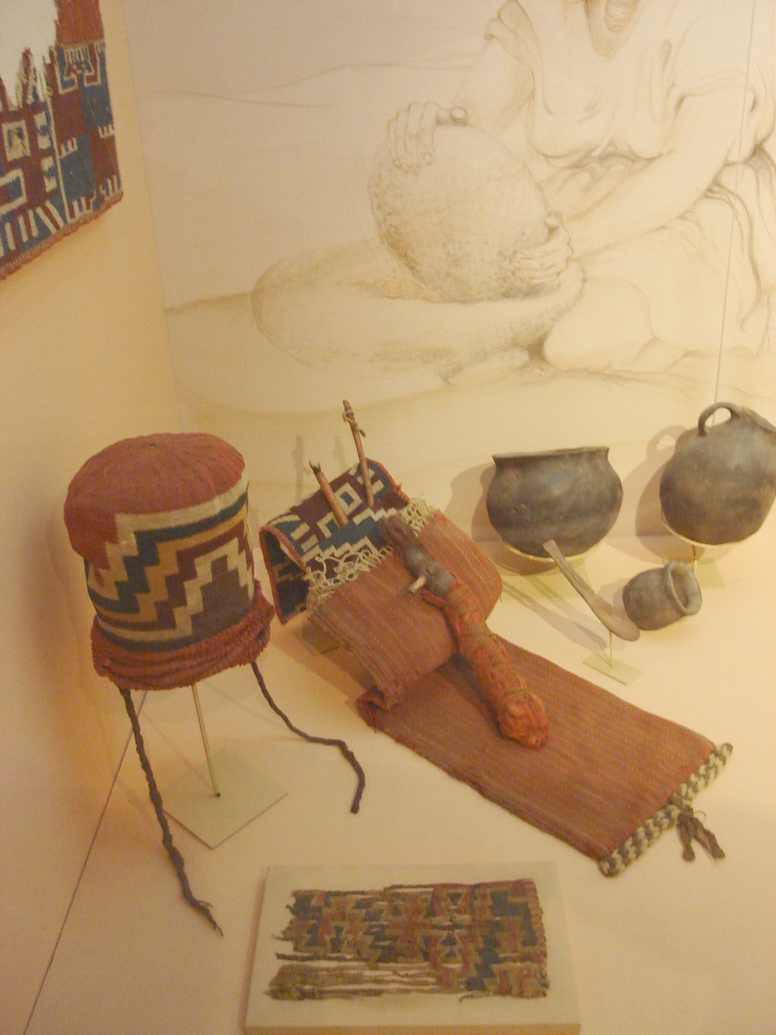 Foto tirada por mim, em Arica.